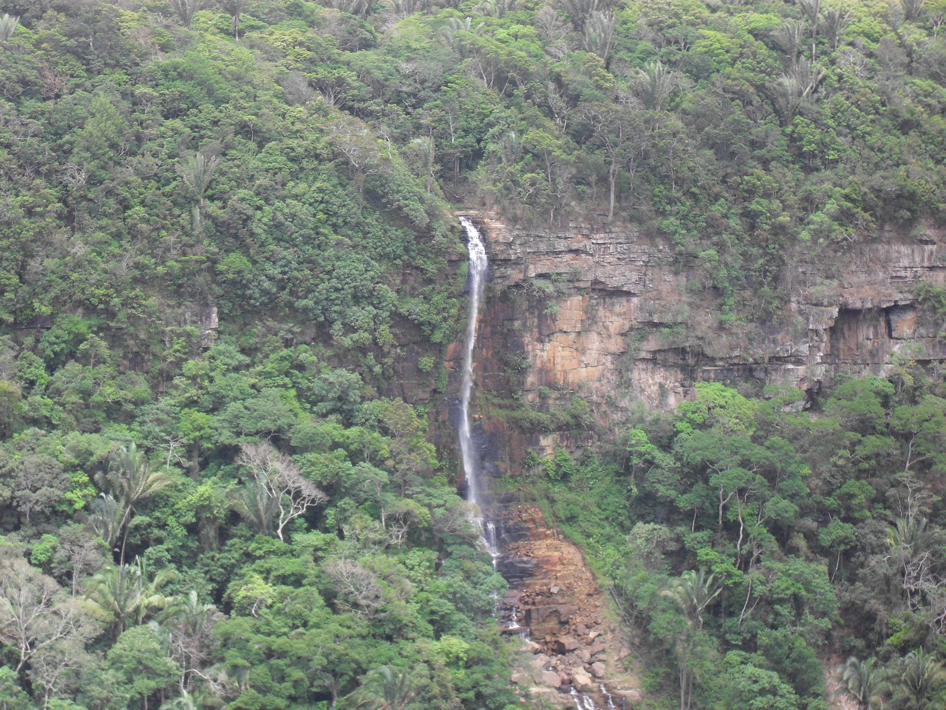 Uma das inúmeras cachoeiras existentes na Mata Atlântica de Ubajara, mais precisamente no Parque Nacional de Ubajara